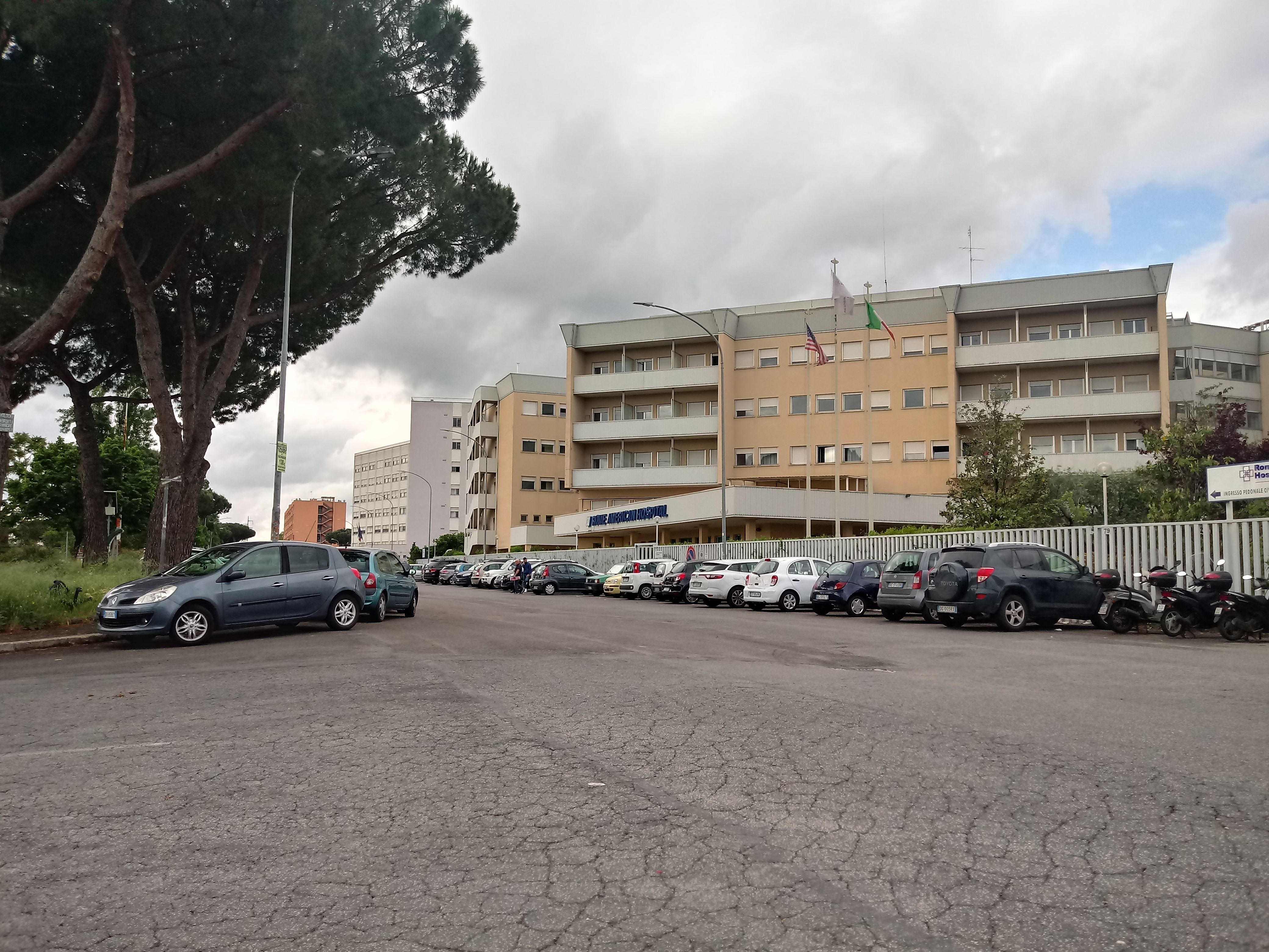 Omo (Rome)